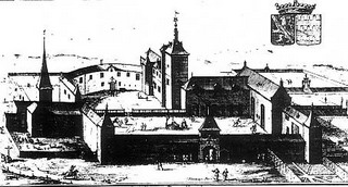 Chateau de Dongelberg